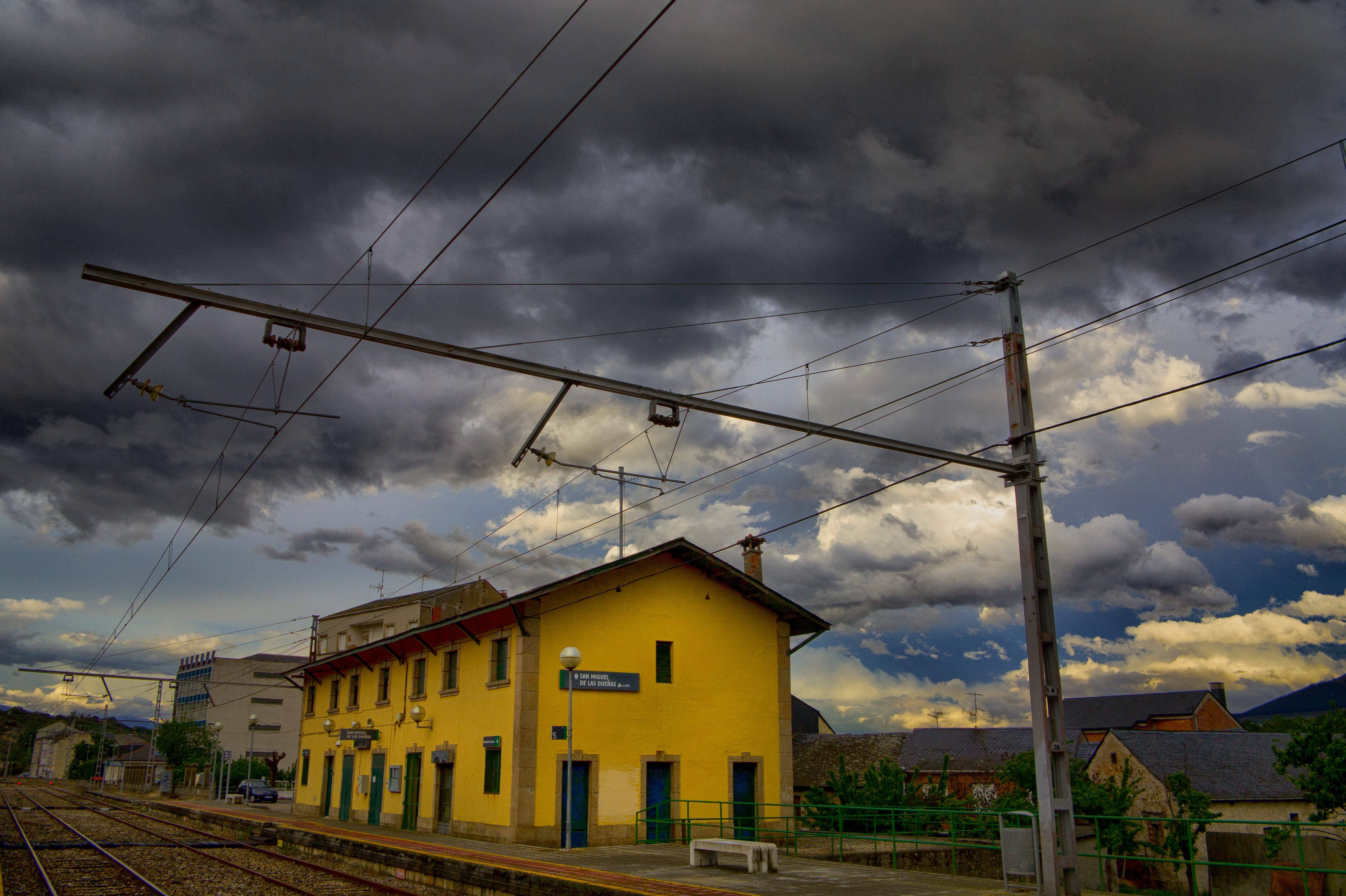 Estación de San Miguel de las Dueñas